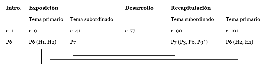 Reconceptualización de la forma sonata en el cuarteto 1 de Gerhard